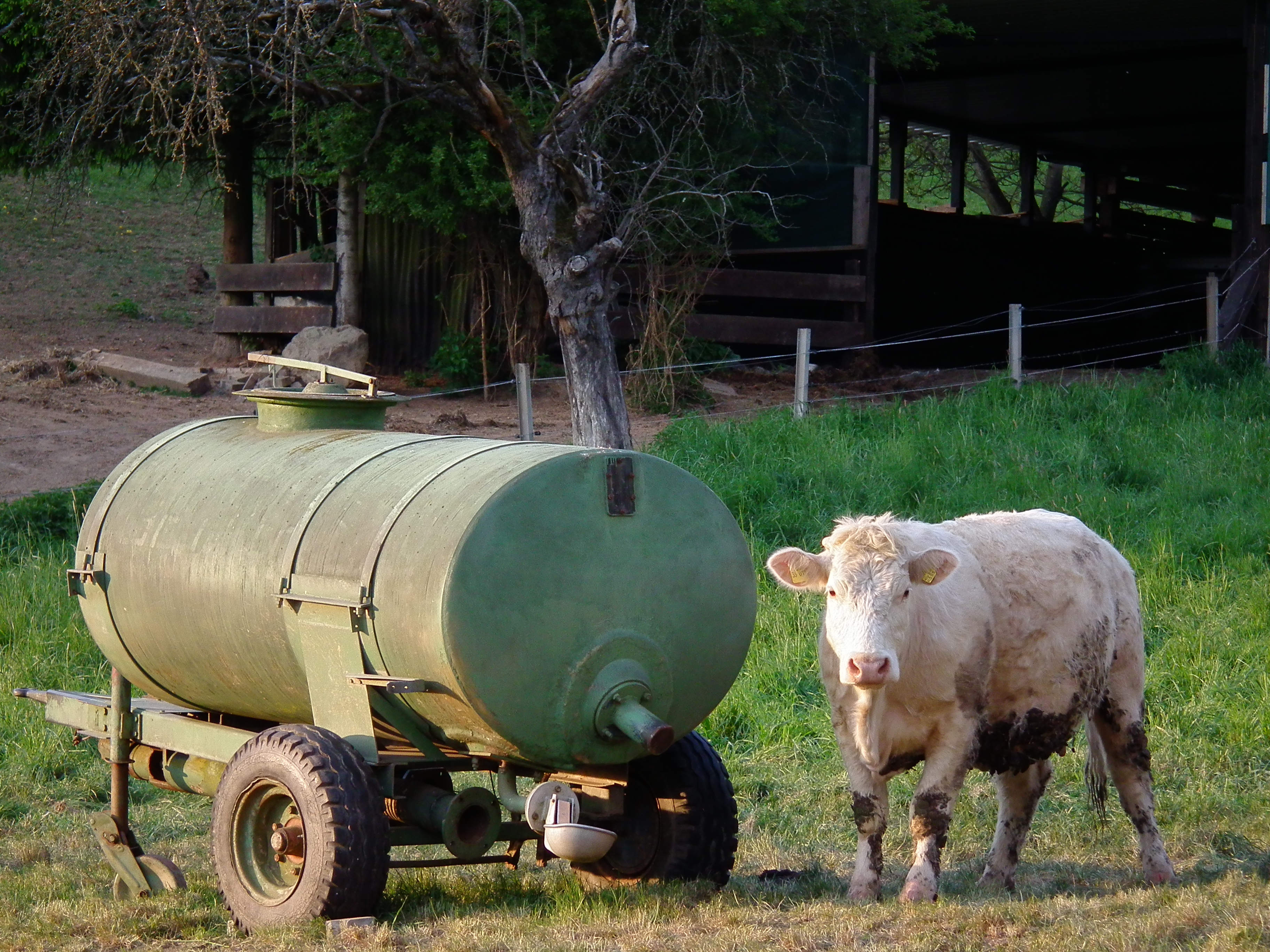 Mutterkuh neben mobiler Viehtränke, fotografiert auf einer Koppel in der Nähe von Linnenbach (Odenwald, Hessen, Deutschland)